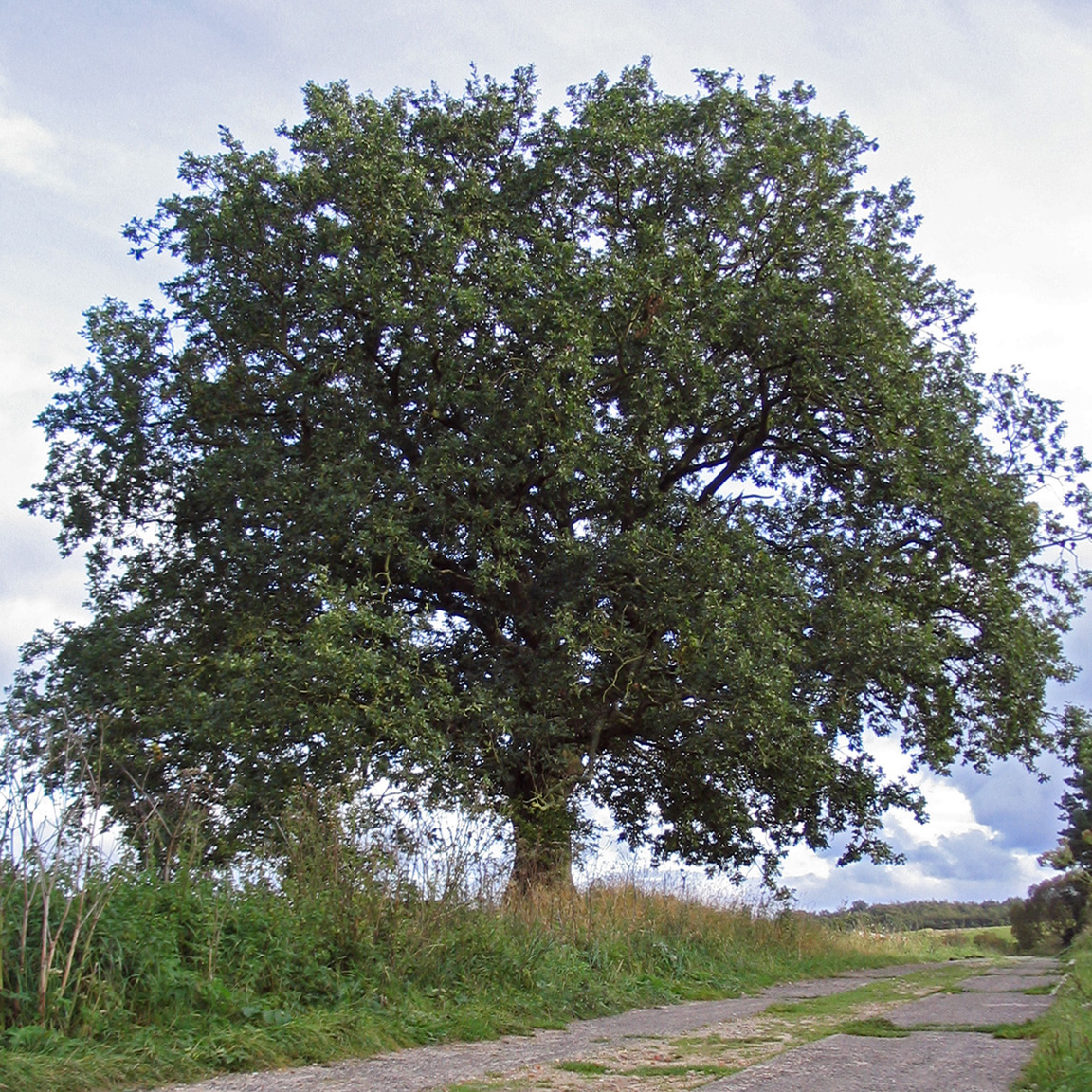 Eiche am Wegesrand